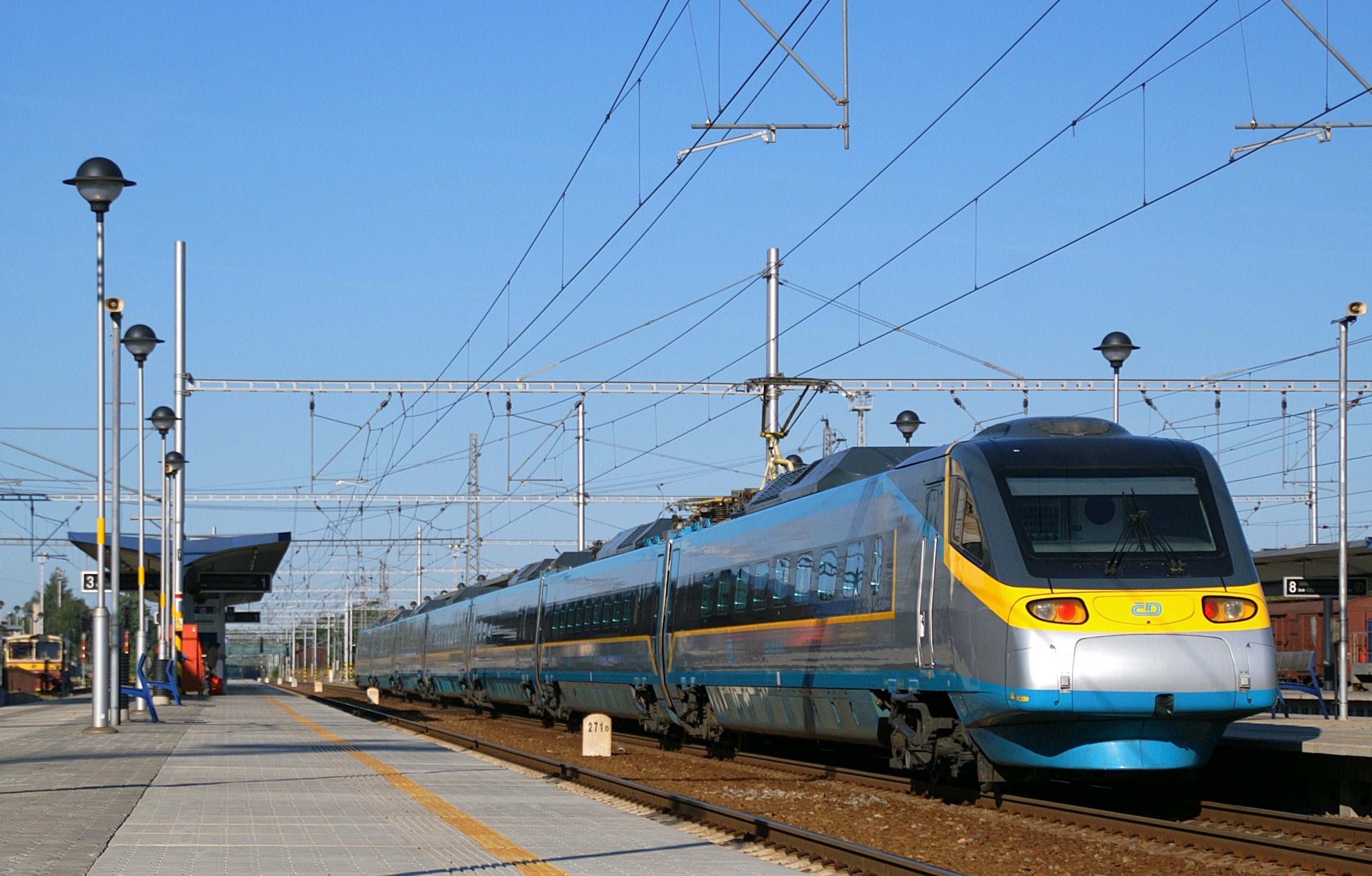 Choceň